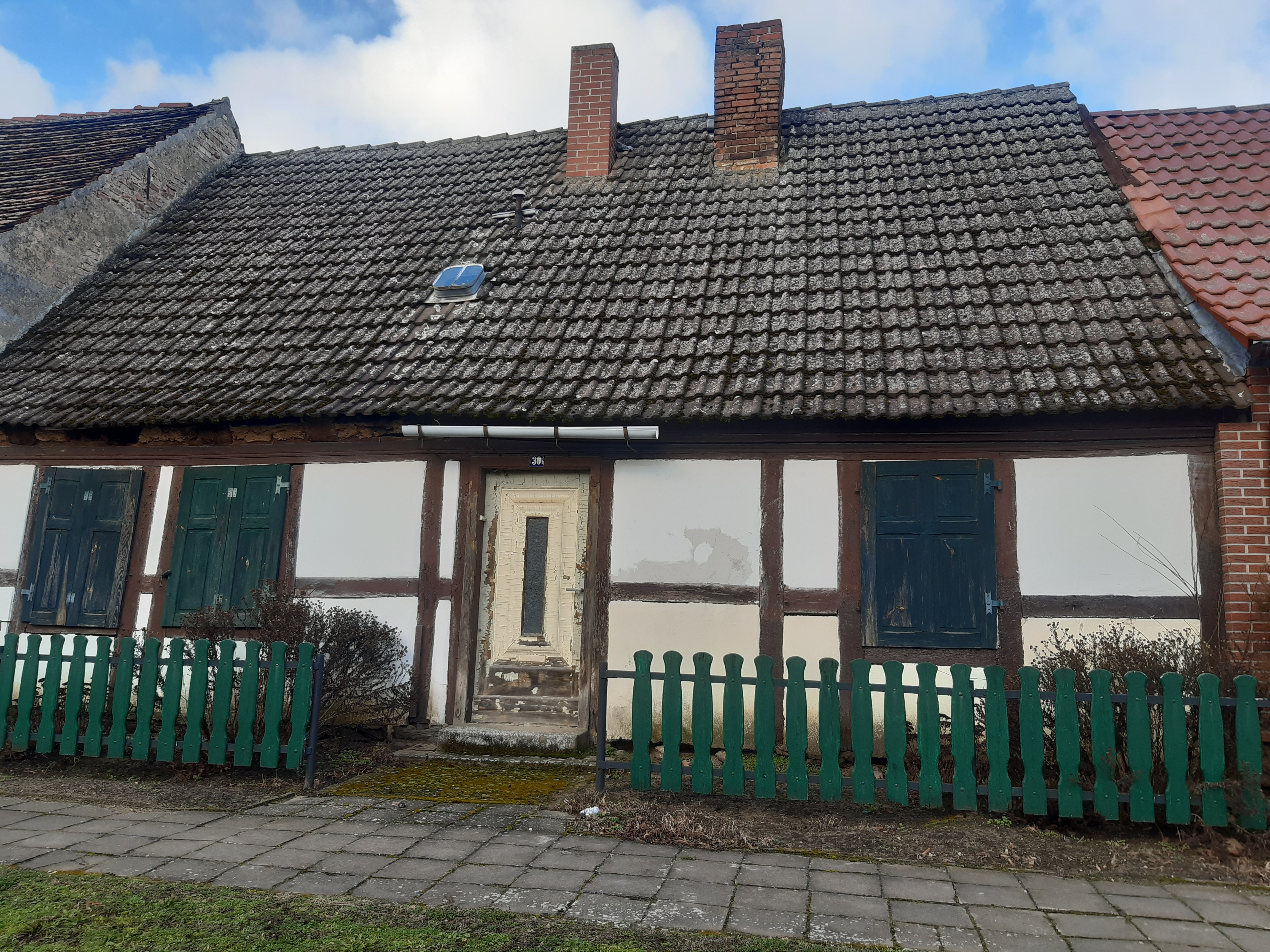 Wohnhaus